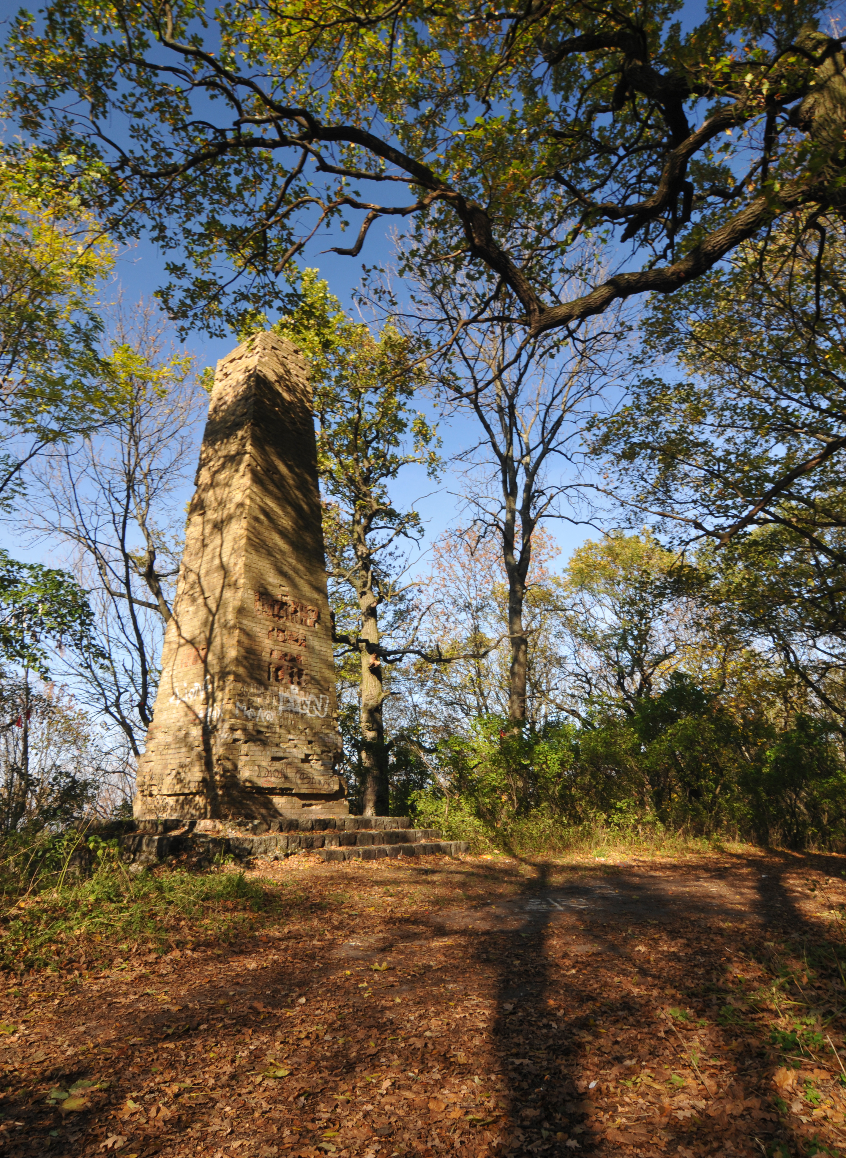 ландшафтний заказник "Мошногірський". Софійчин стовп